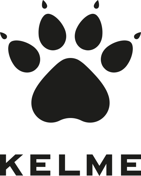 Nuevo logotipo de Kelme